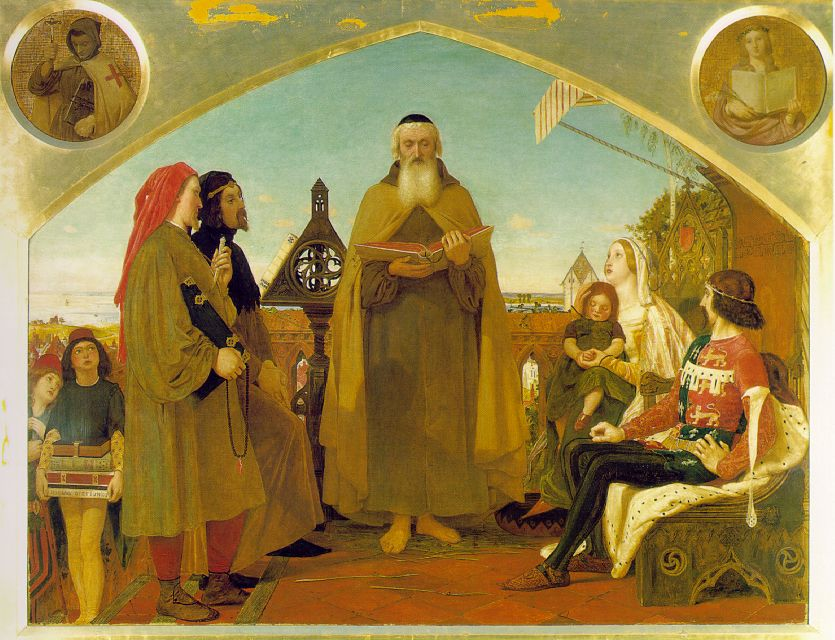 John Wyclif leest zijn Bijbelvertaling voor aan Jan van Gent - olie op canvas van Ford Madox Brown (1821-1893) - hij is langer dan 70 jaar dood, derhalve geen copyright